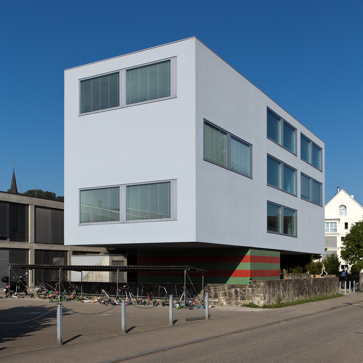 Schulhaus Seefeld in Spreitenbach (AG)